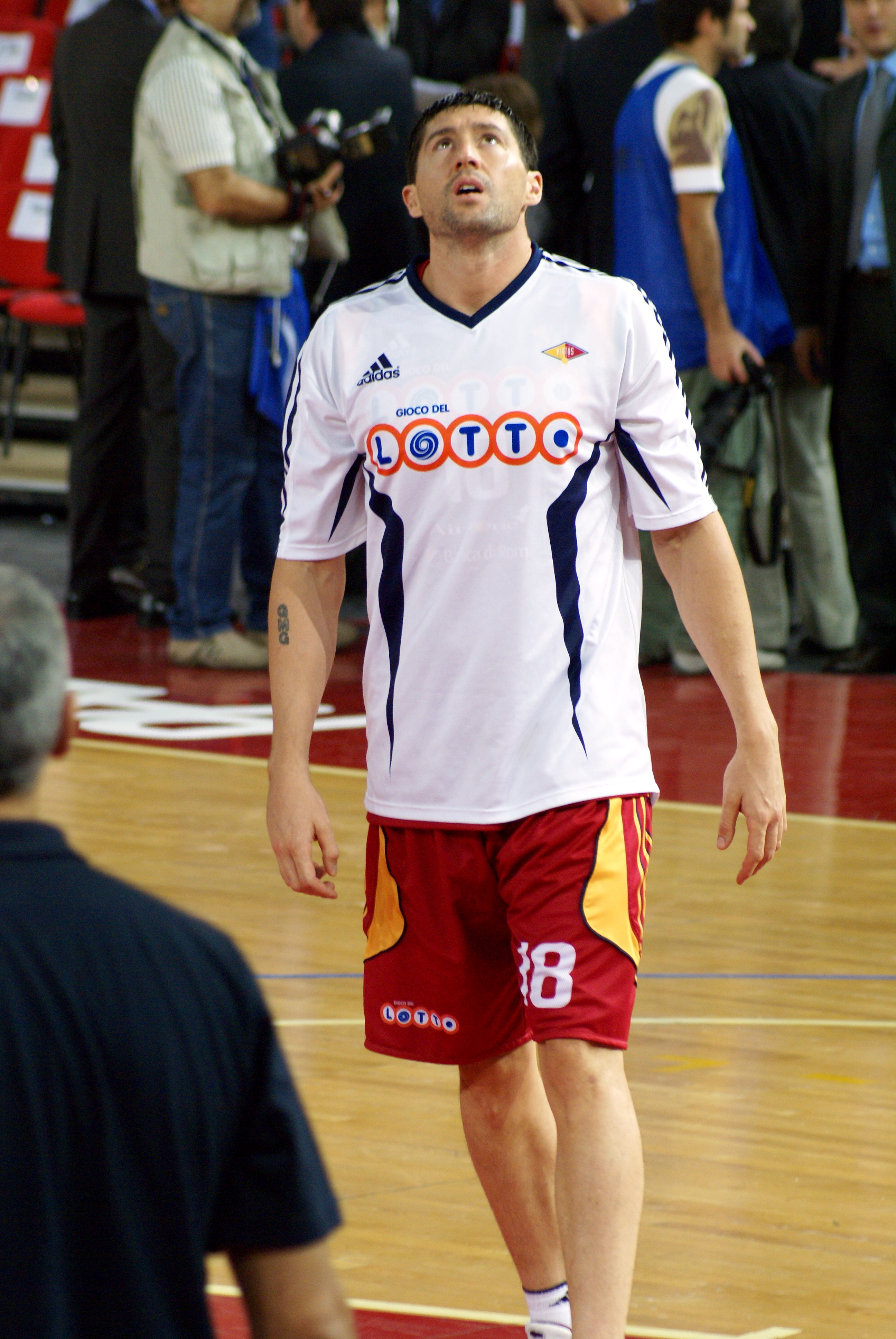 Roberto Gabini